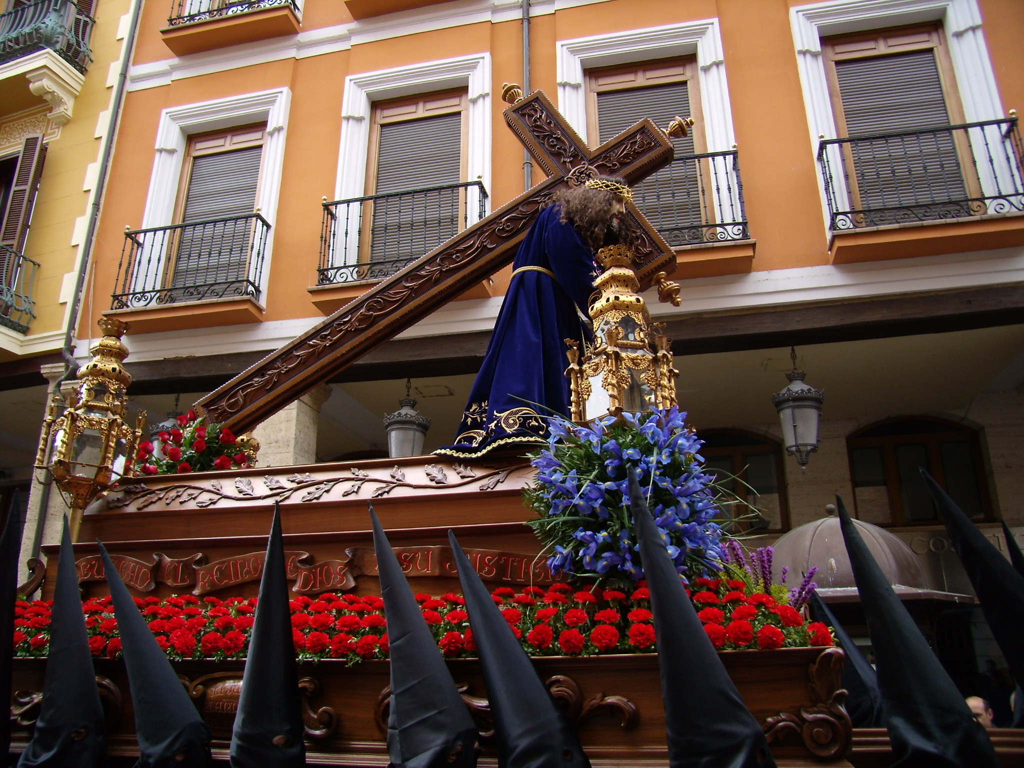 Nuestro Padre Jesús Nazareno, de Tomás de la Sierra (1717). Semana Santa de Palencia.